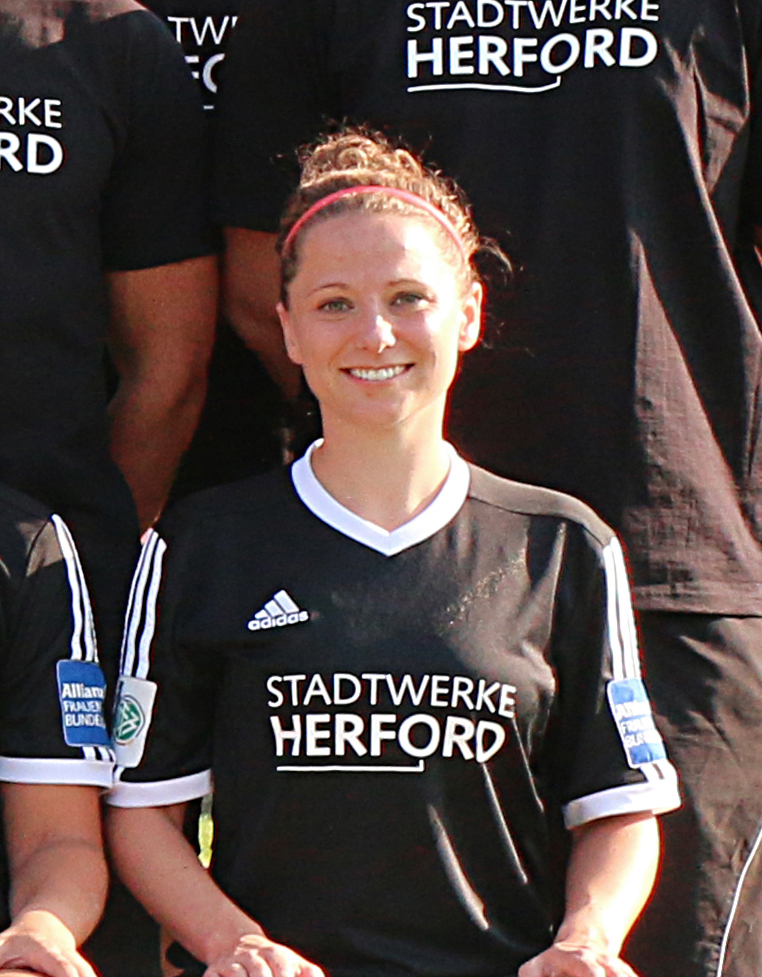 Herforder SV Borussia Friedenstal Team 2014/2015